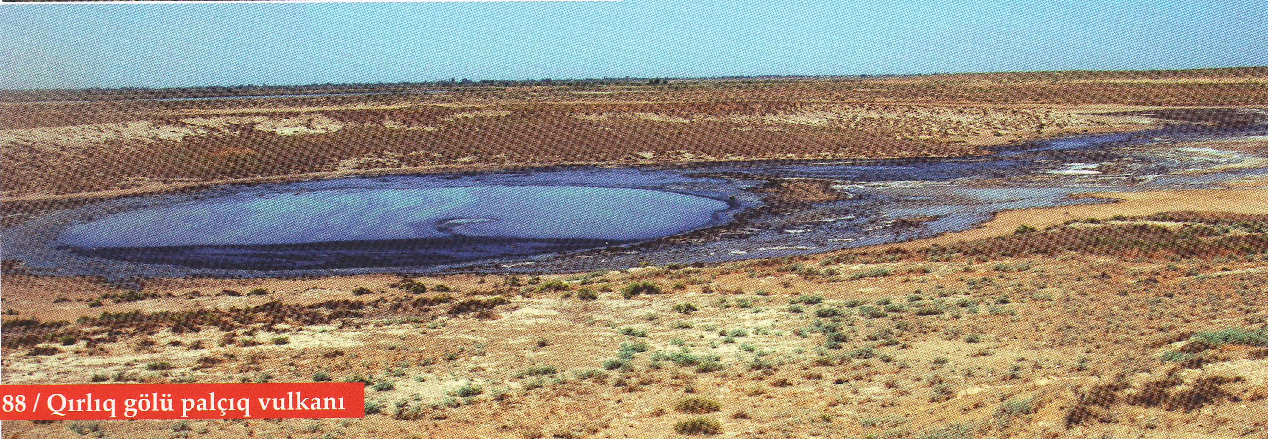 Neftçala rayonu Qırlıq gölü palçıq vulkanı